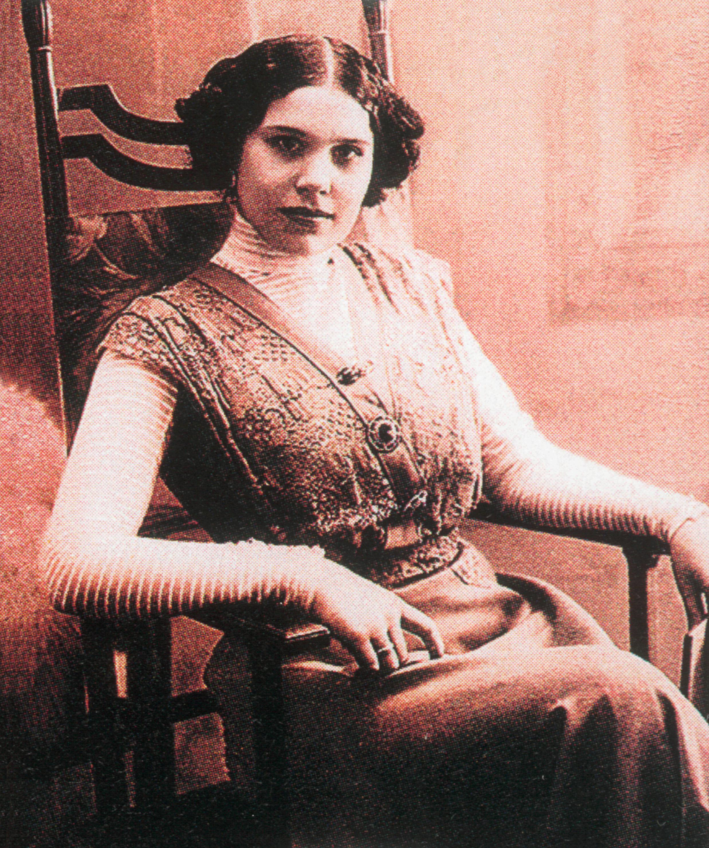 Певица Надежда Плевицкая. Фото из книги "Надежда Плевицкая" издательства АСТ (2005) - с дореволюционной настольной фотографической карточки (паспарту). 1910-е